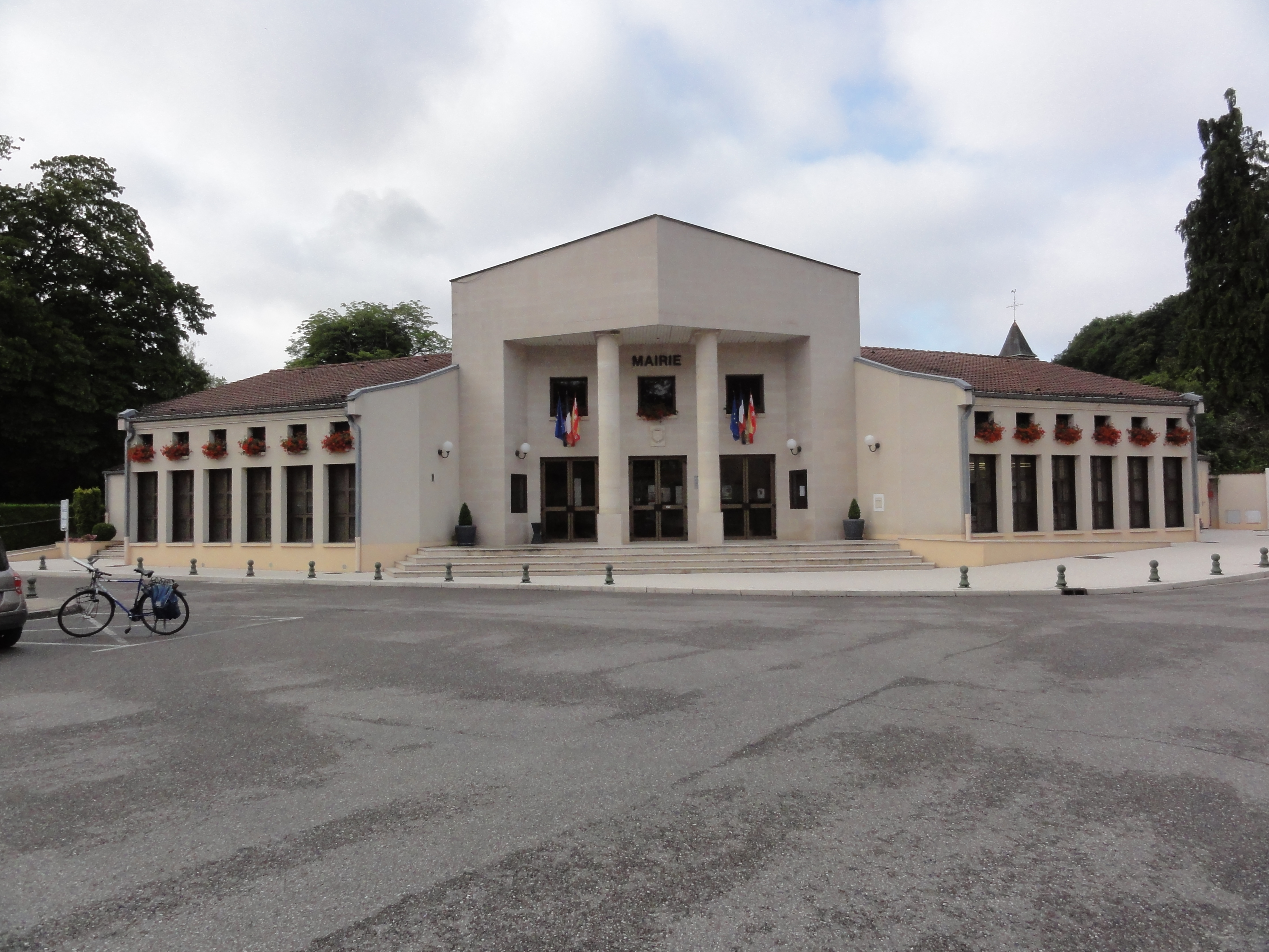 Savonnières-devant-Bar (Meuse) mairie